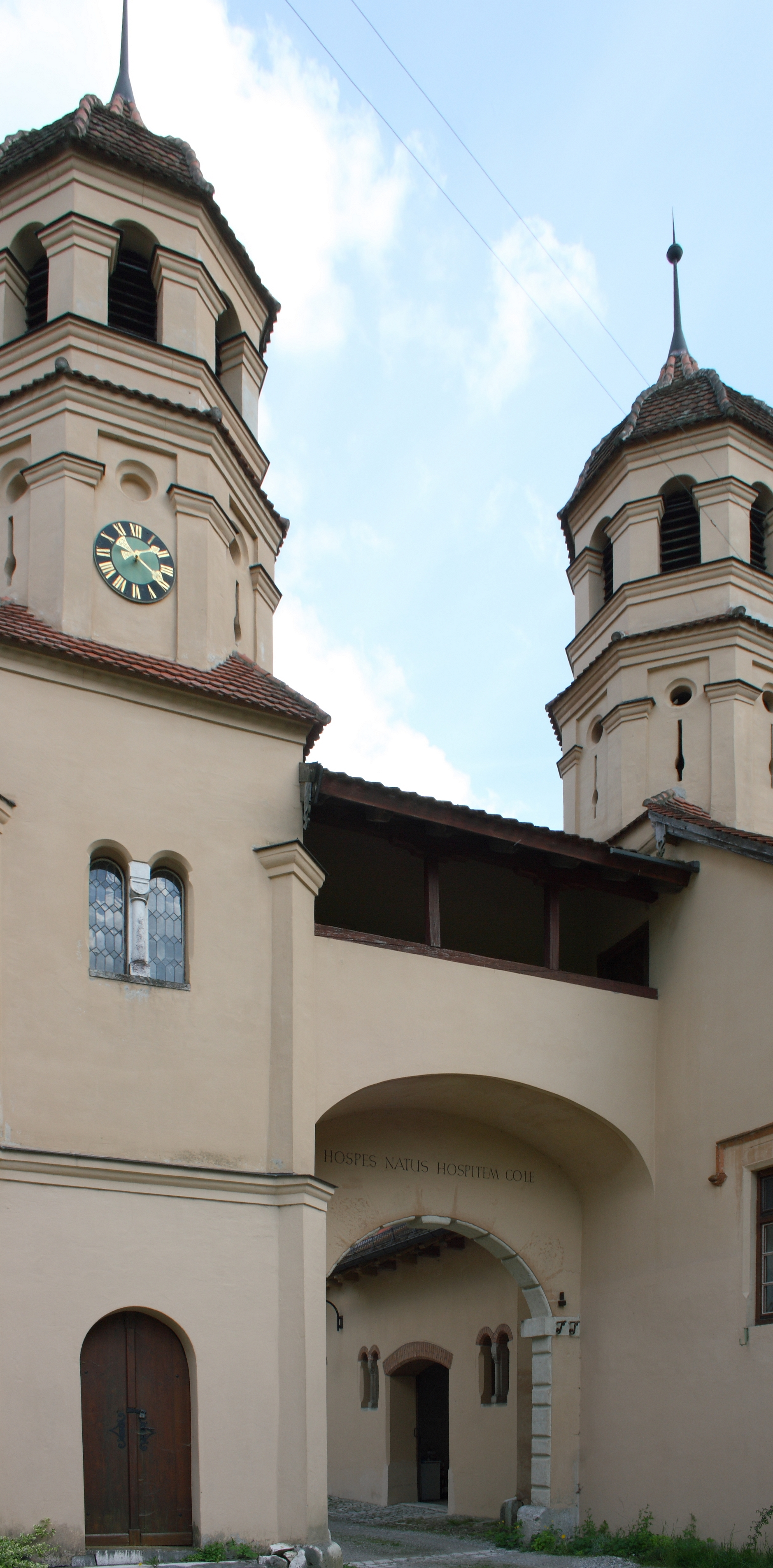 Schloss Haunsheim in der Gemeinde Haunsheim im Landkreis Dillingen an der Donau (Bayern), Schlosstor